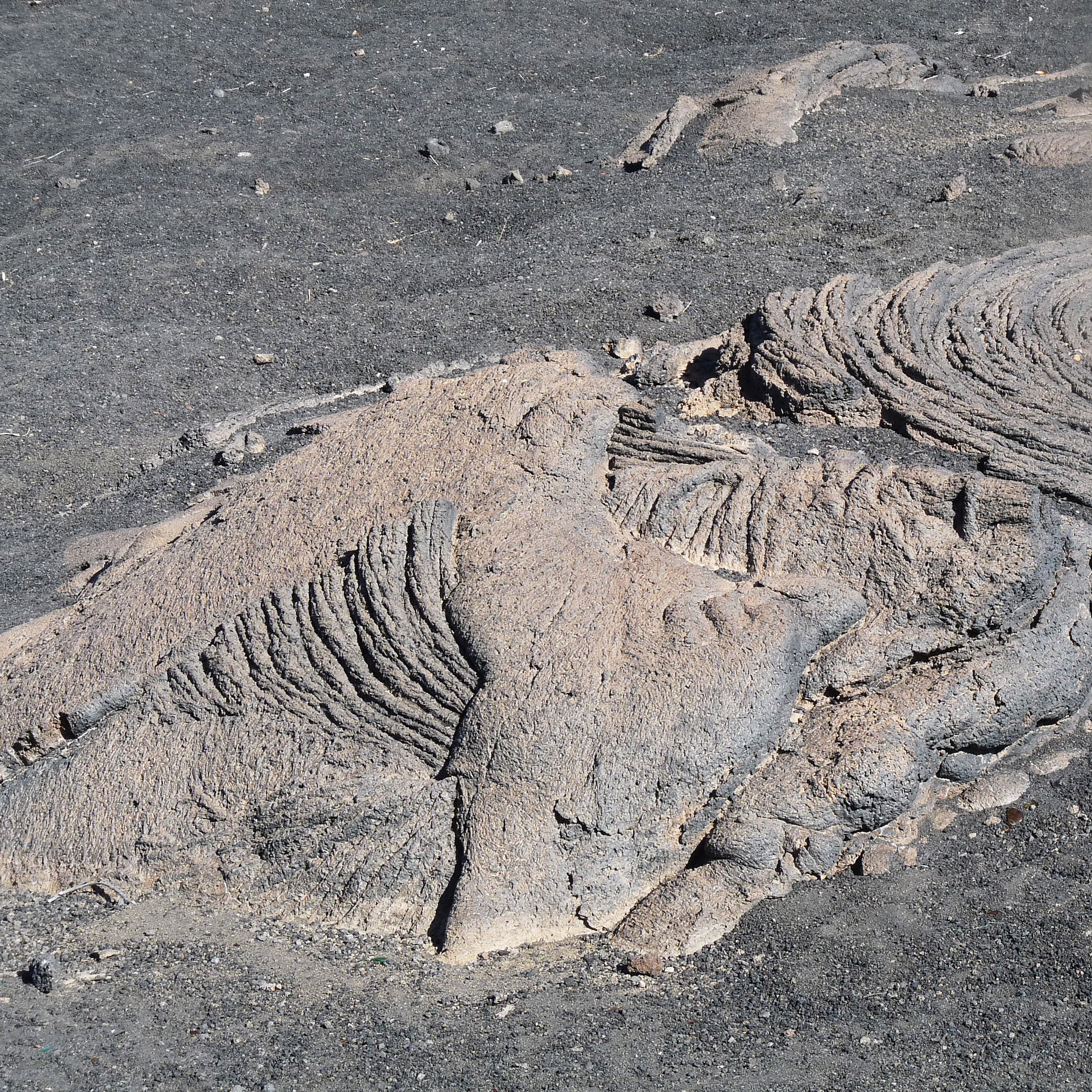 Lave cordée au Pico de Fogo (Cap-Vert)